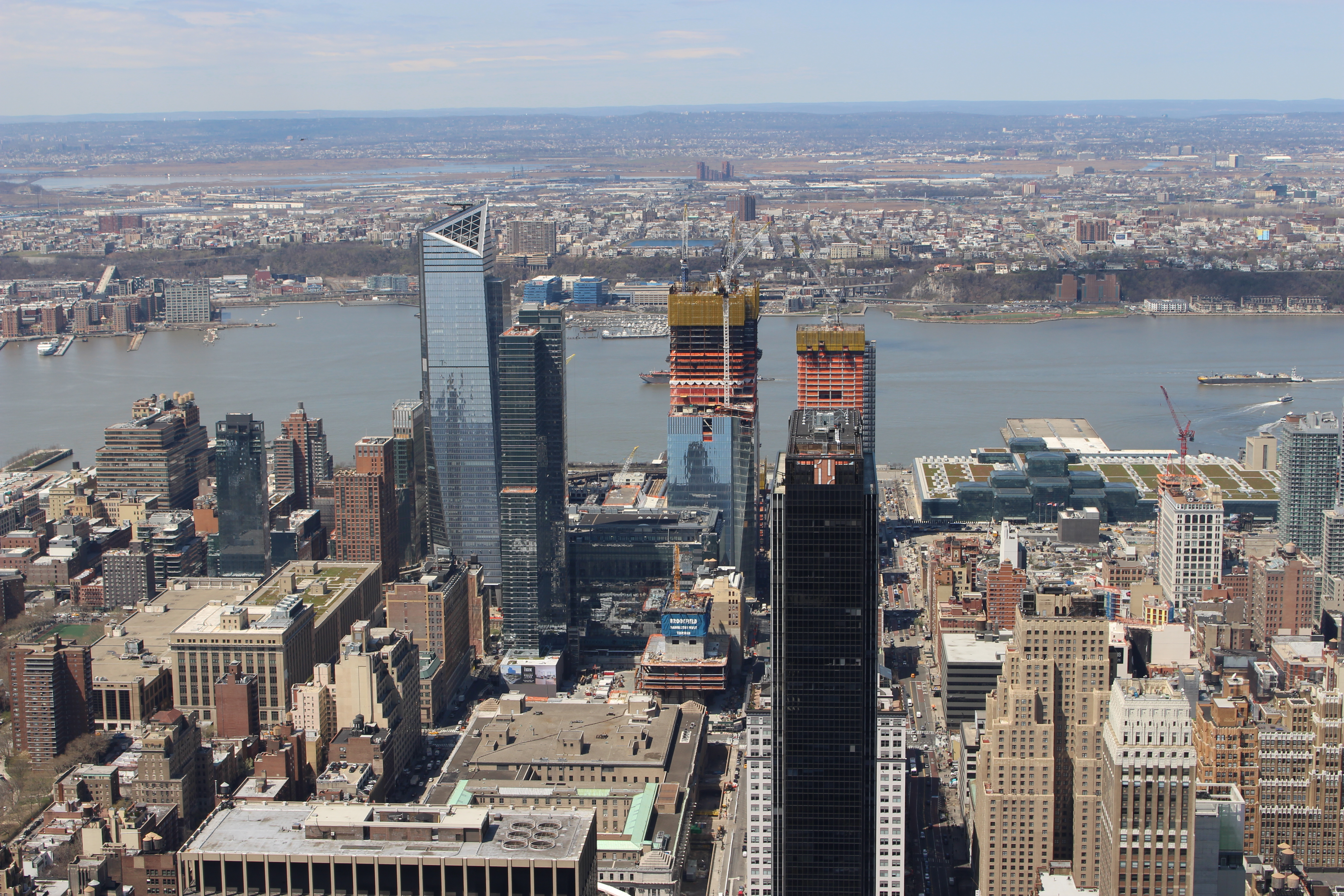 Hudson Yards am 14.07.2017, gesehen vom Empire State Building